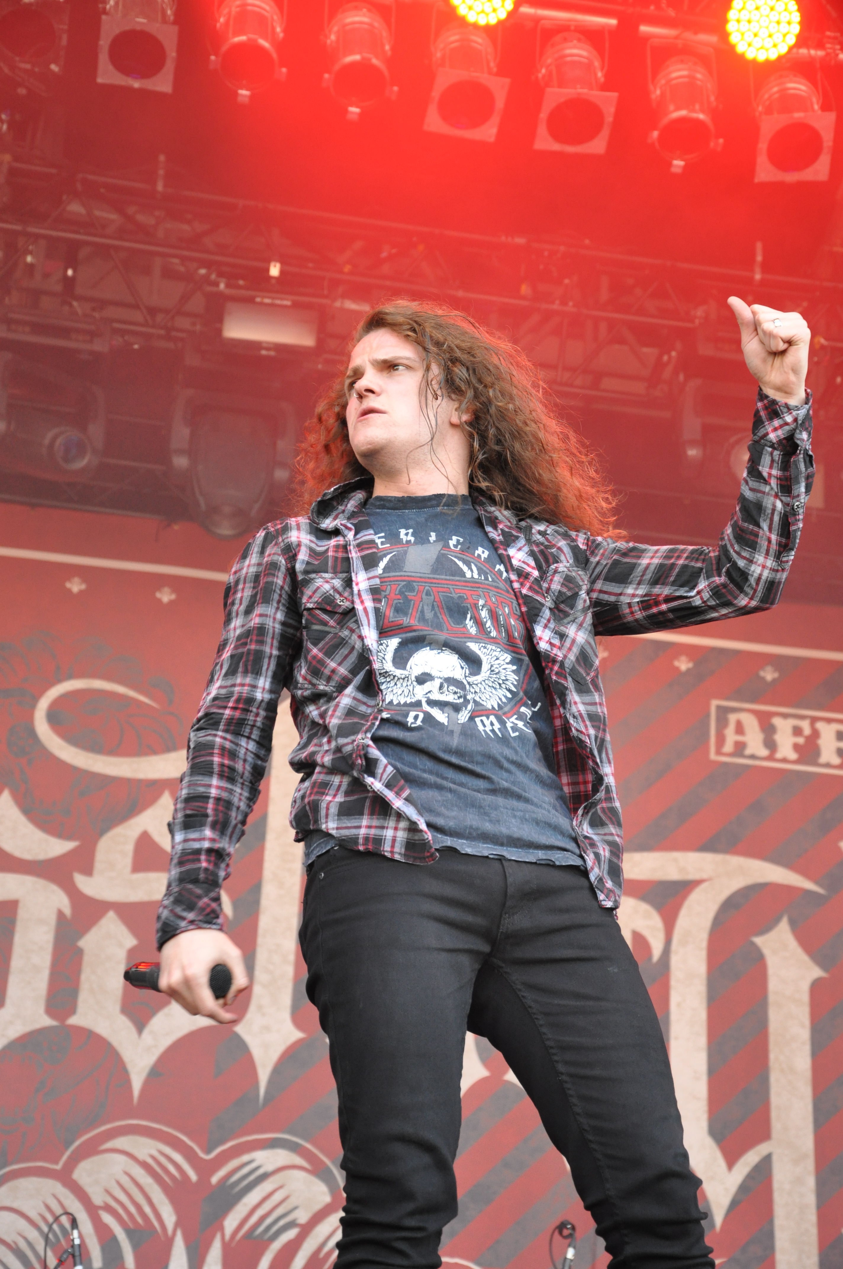 Miss May I auf der Clubstage bei Rock am Ring 2014